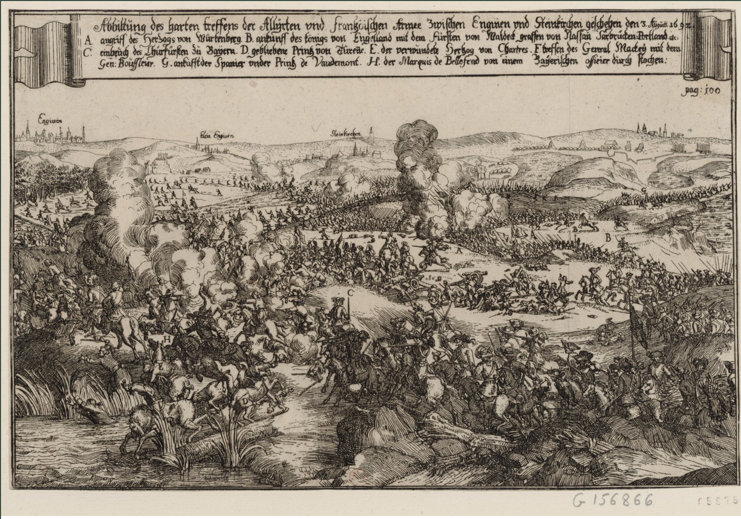 Bataille de Steinkerque (1692) - Scènes historiques -- 17e siècle